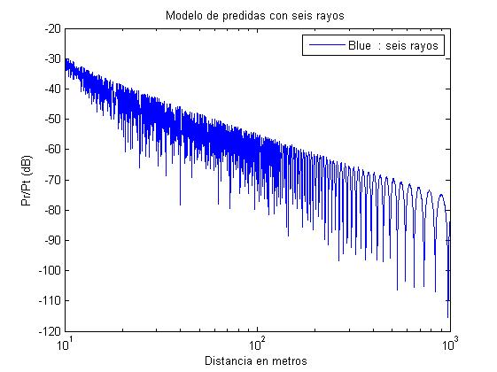 modelamiento que describe las perdidas por trayectoria de espacio linbre en el modelo de 6 rayos cuando la distacia de la pared son distintas al igual que las alturas